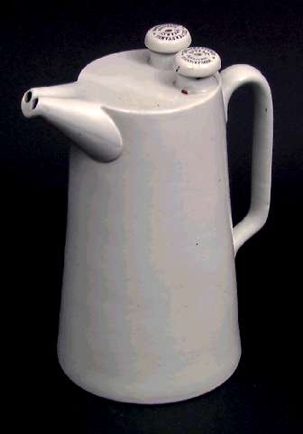 Seltersmugge i keramikk. Trykt påskrift 'seltersvandsapparat Egersunds Fayancefabrik'. Foto Norsk Folkemuseum, NF.1954-0547.